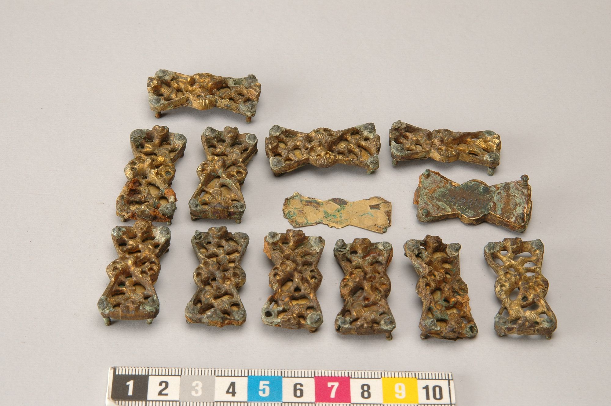 Broabetslet, vikingatida hästbetsel. Foto: Elisabet Pettersson, 2006-11-17, SHMM. Inventarienummer 11106